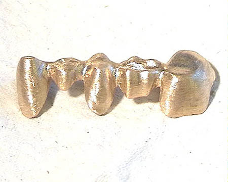 dental bridge, Zahnbrücke